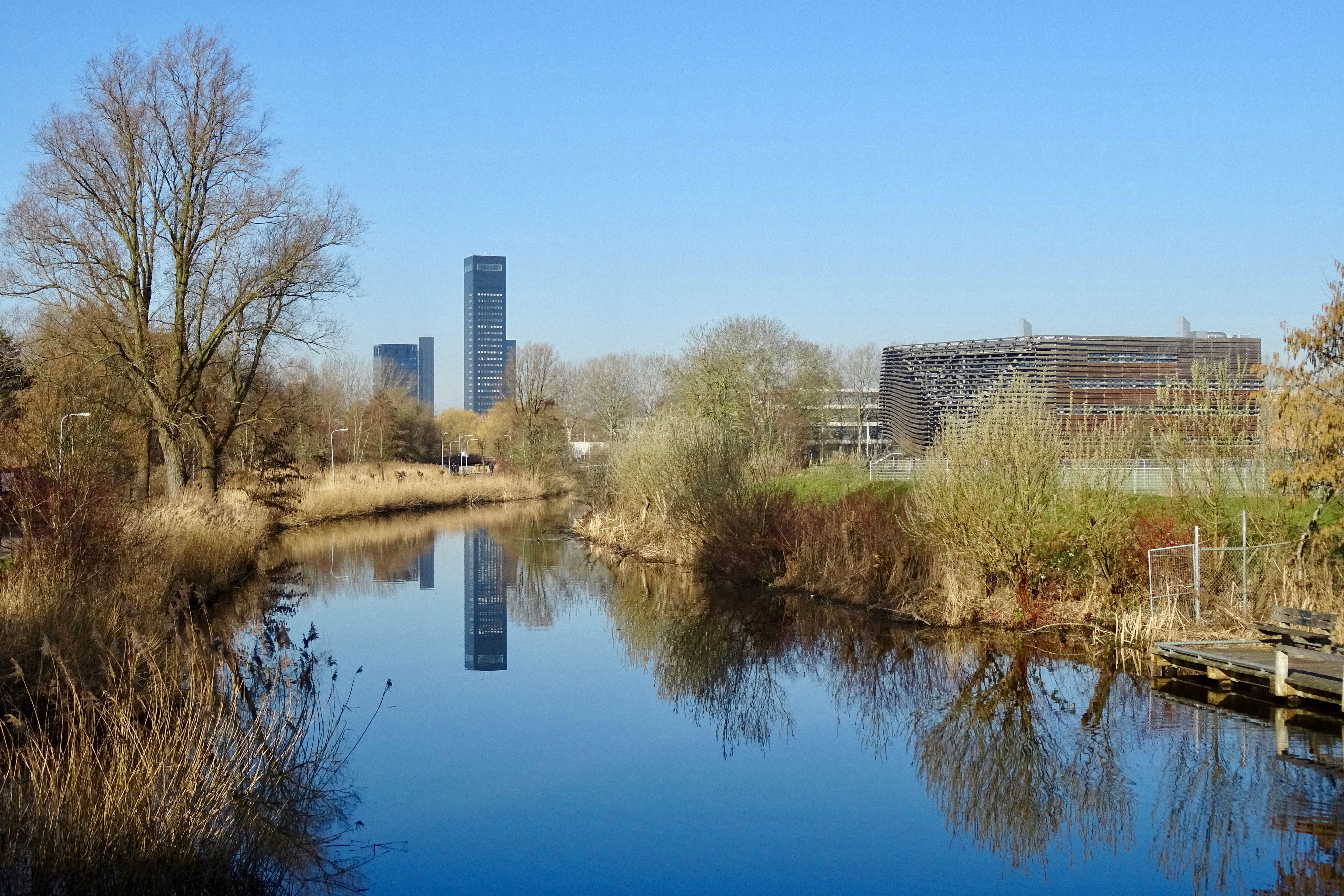 Zicht op Leeuwarden met Achmeatoren (midden) en Watercampus (rechts) vanaf een brug over de Potmarge